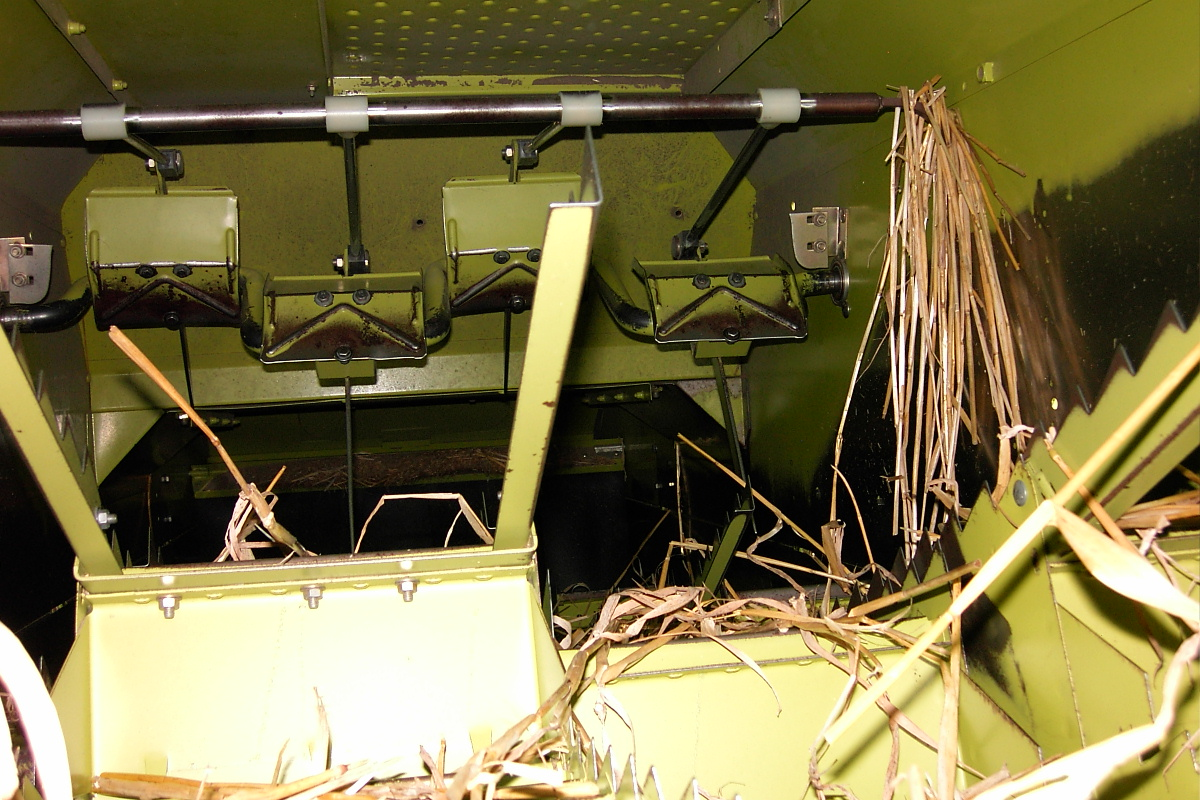 Schüttler eines Claas Dominator